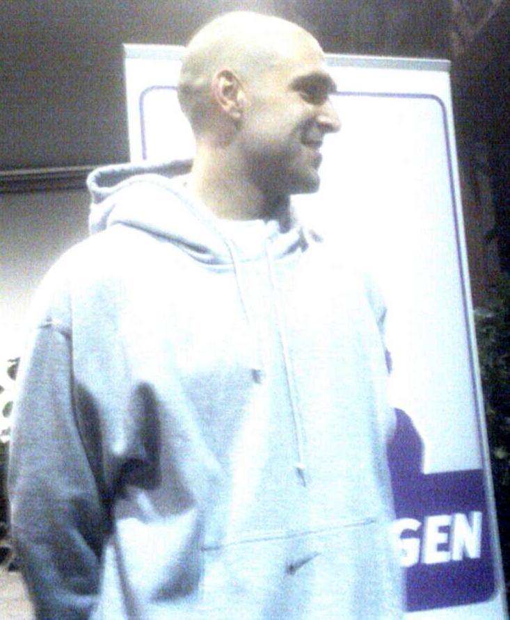 Jeb Ivey bei einem Interview nach einem Spiel